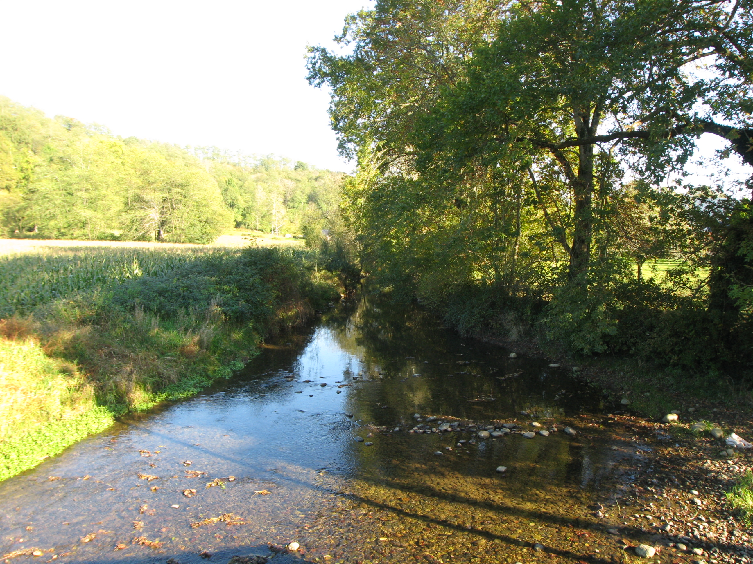 Vue de la rivière Escou au village d'Escout (Pyrénées Atlantiques) Pyrénées).